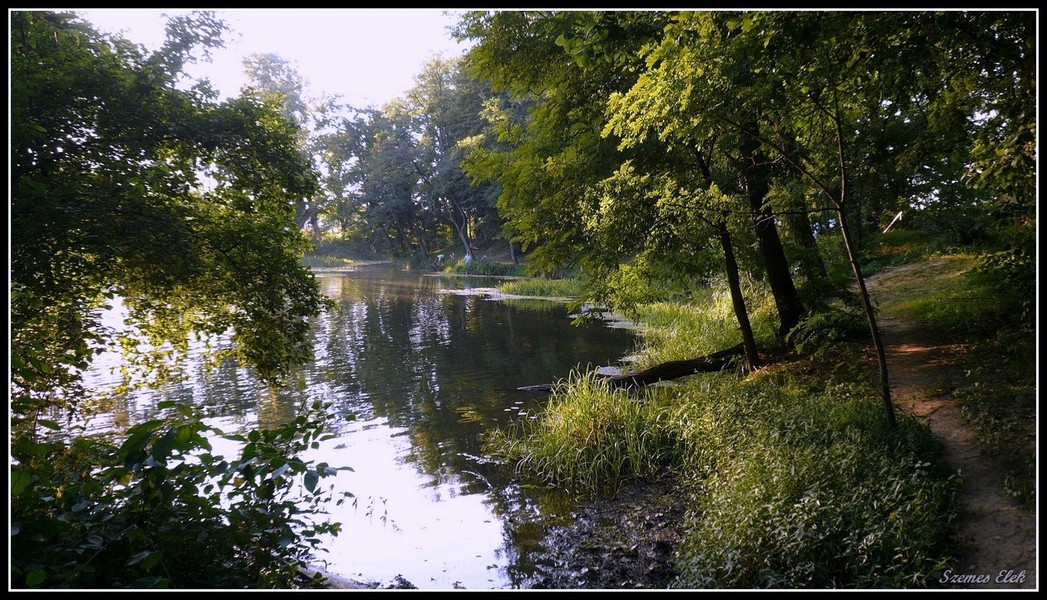 Túristvándi, 4944 Hungary